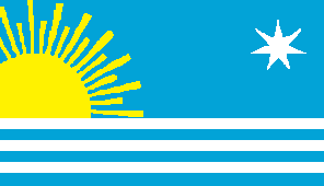 Bandera del municipio Araure, estado Portuguesa, Venezuela